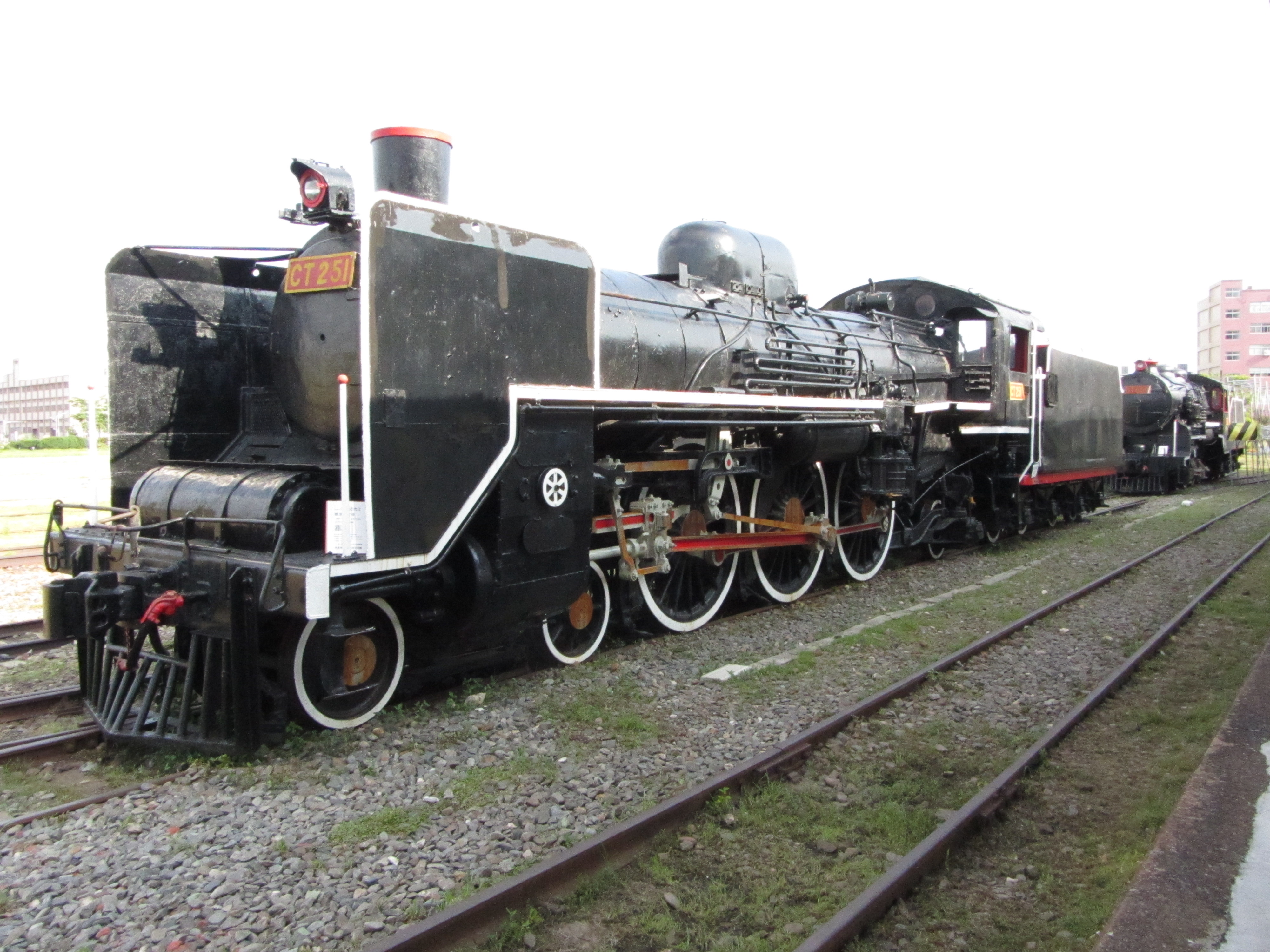 在打狗鐵道故事館的CT251（實際上是CT259，前）和DT609（後）